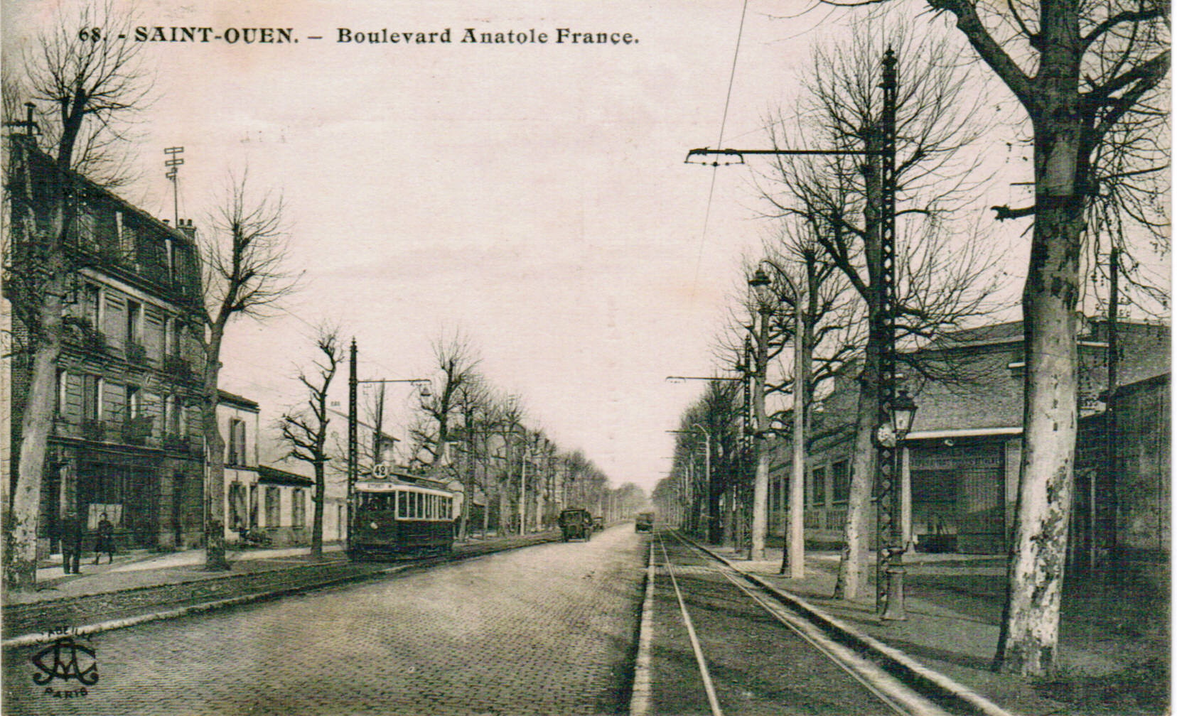 Carte postale ancienne éditée par Abeille à Paris, n° 68SAINT-OUEN - Boulevard Anatole FranceVue d'un tramway de la STCRP, ligne 42 (Saint-Denis (Barrage) - Madeleine, circulant sur deux voies en banquette, hors de la chaussée